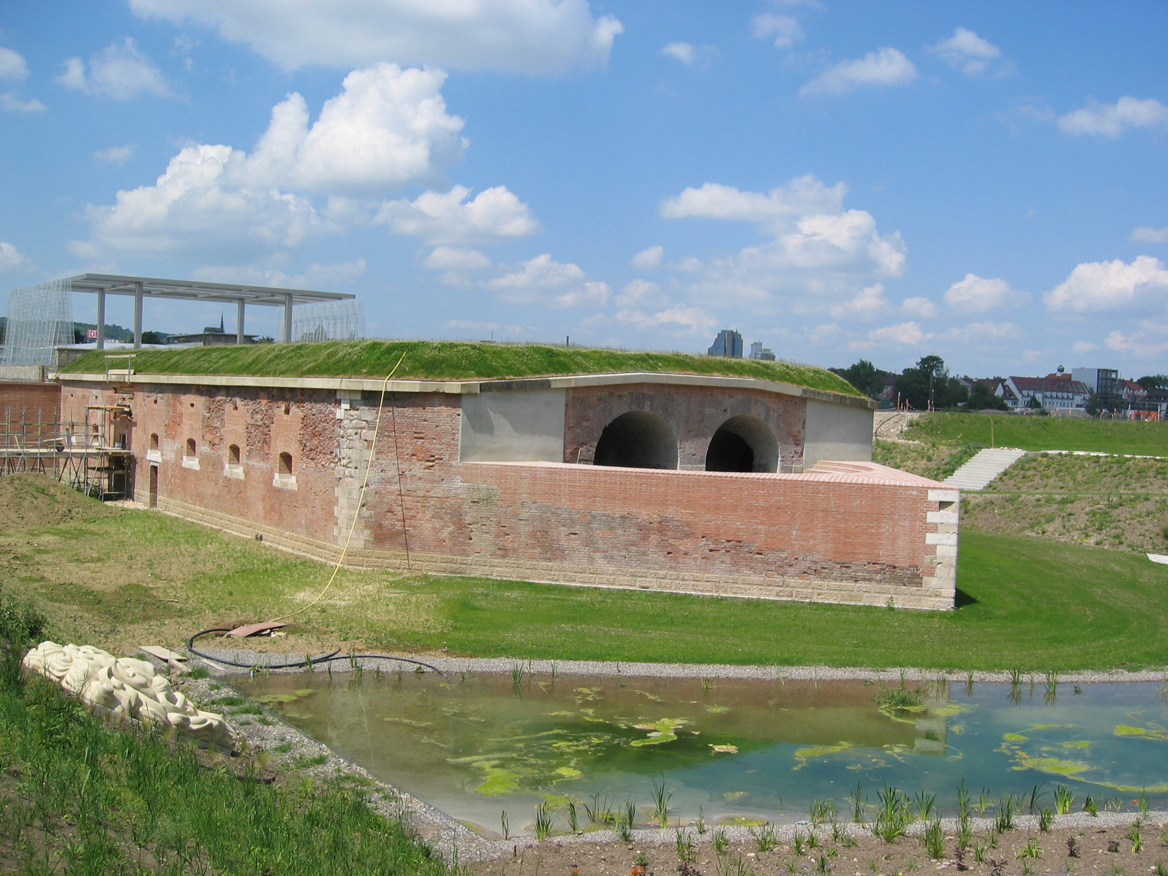 Carponiere 4 im Juni 2007 der Bundesfestung Ulm